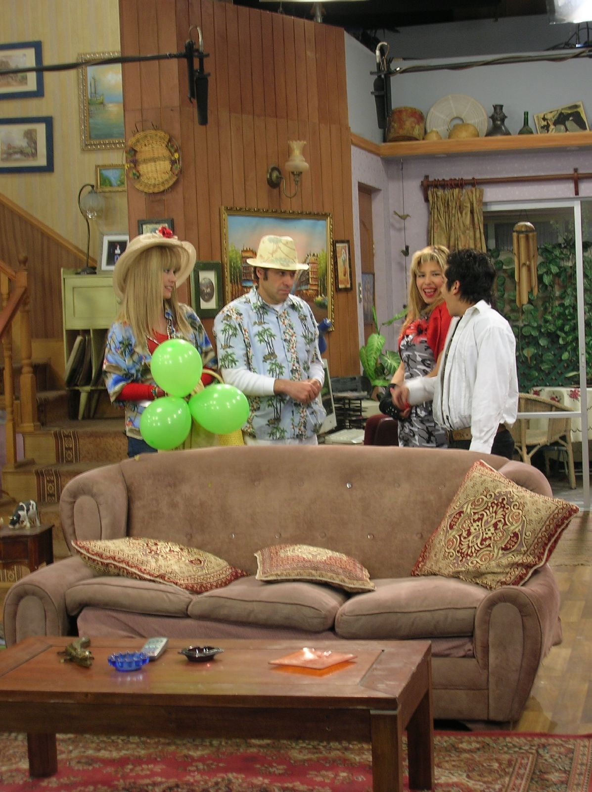 Grabacion de un capitulo de la versión chilena de "Casado con Hijos". De izquierda a derecha: Javiera Contador (Quena), Fernando Larraín (Tito), Dayana Amigo (Titi), Fernando Godoy (Nacho).